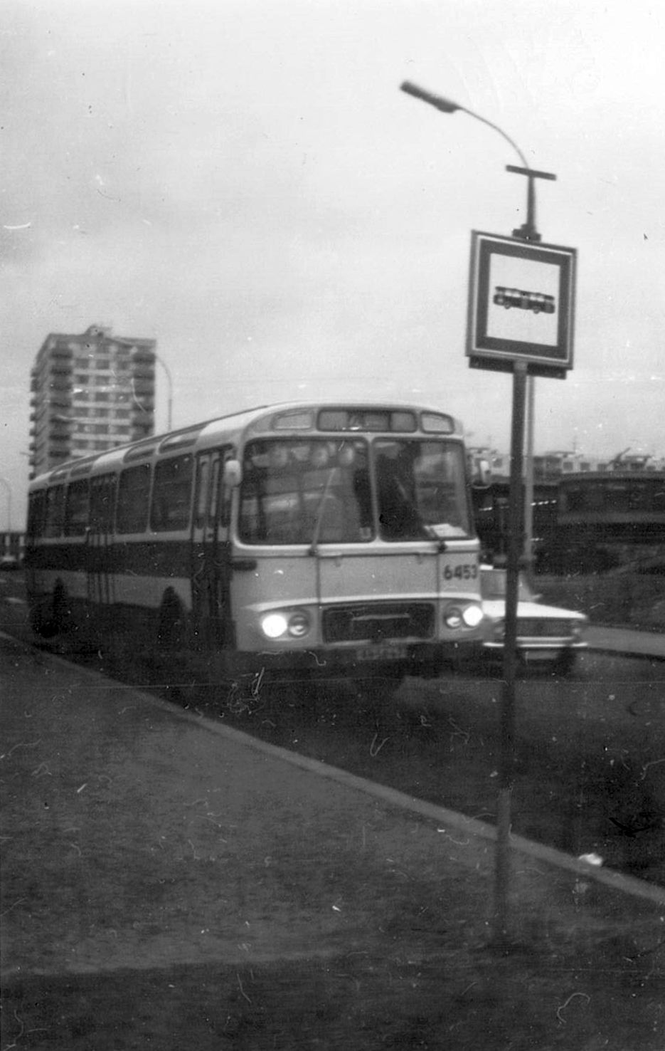 Praha, autobus ŠM 11 ev. č. 6453 na lince 224 v zastávce Zahradní Město, Cíl.